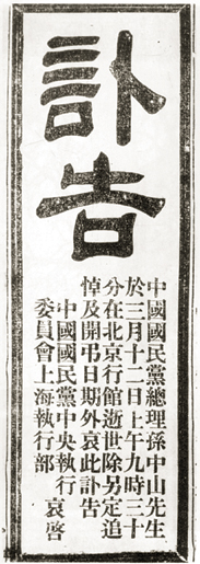 中国国民党中央执行委员会上海执行部为孙中山逝世发布的讣告